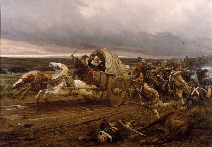 La déroute de Cholet, octobre 1793